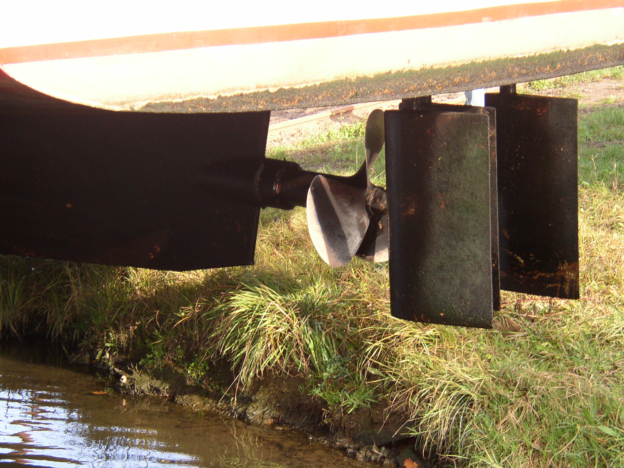 Dreiflächen–Ruder Typ Jenkel am Fahrgastschiff Typ III